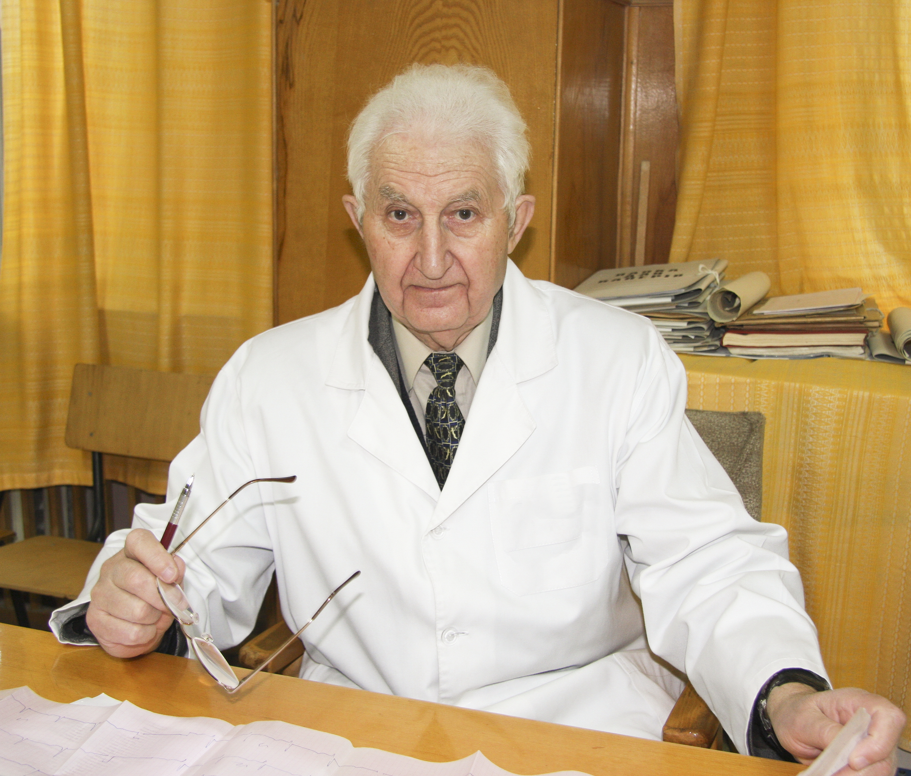 Уродженець с. Вовкове , фото. проф. Фатула М. І.